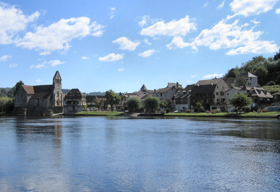 Beaulieu-sur-Dordogne, Frankreich